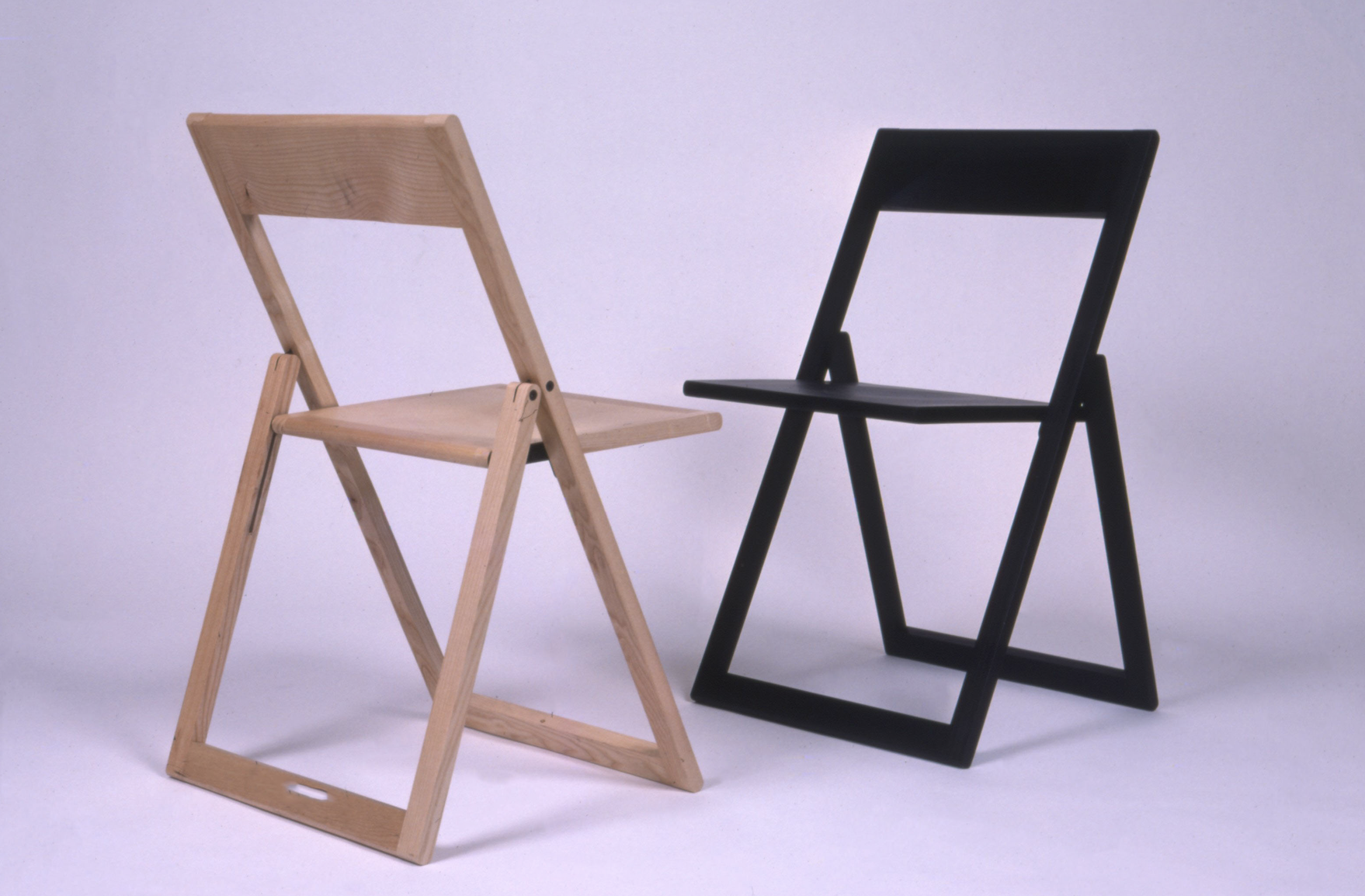 Marc Berthier-Chaises Aviva